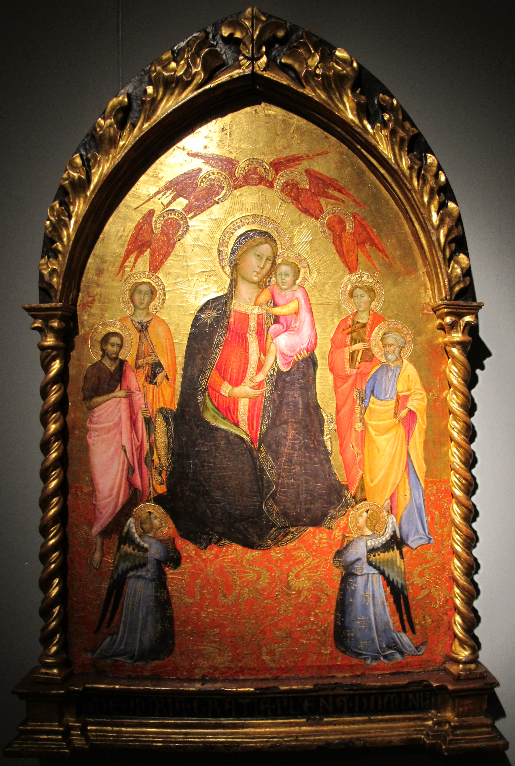 Cennino cennini, madonna col bambino tra angeli e santi, tavola, 82x58 cm, coll privata